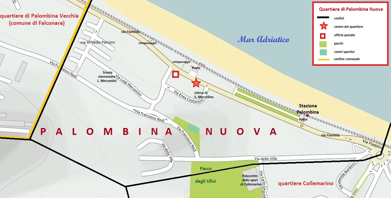 Mappa del quartiere Palombina -Nuova di Ancona, con i confini, le vie, le piazze e i parchi.